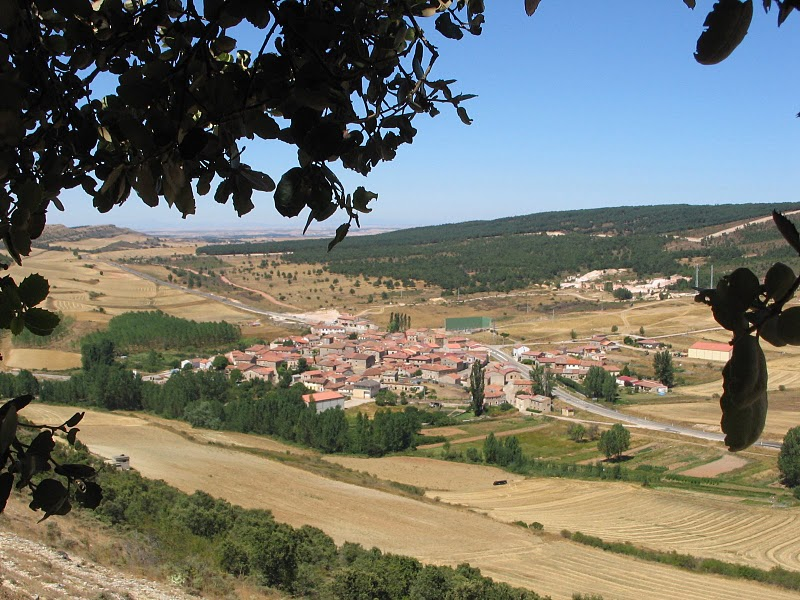 Vista de Cuevas de San Clemente, Burgos, Castilla y León, España.